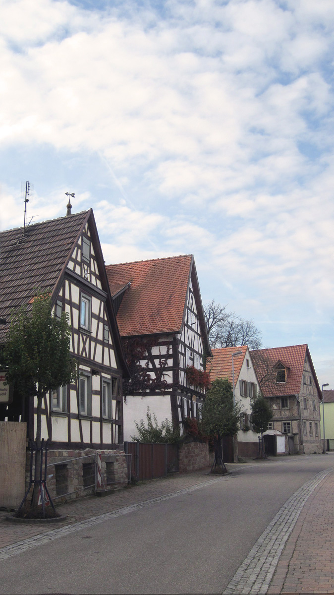 Ansicht Fachwerkhäuser in der Grünwaldstraße in Hördt, Nummern 5, 7, 11 (von links)